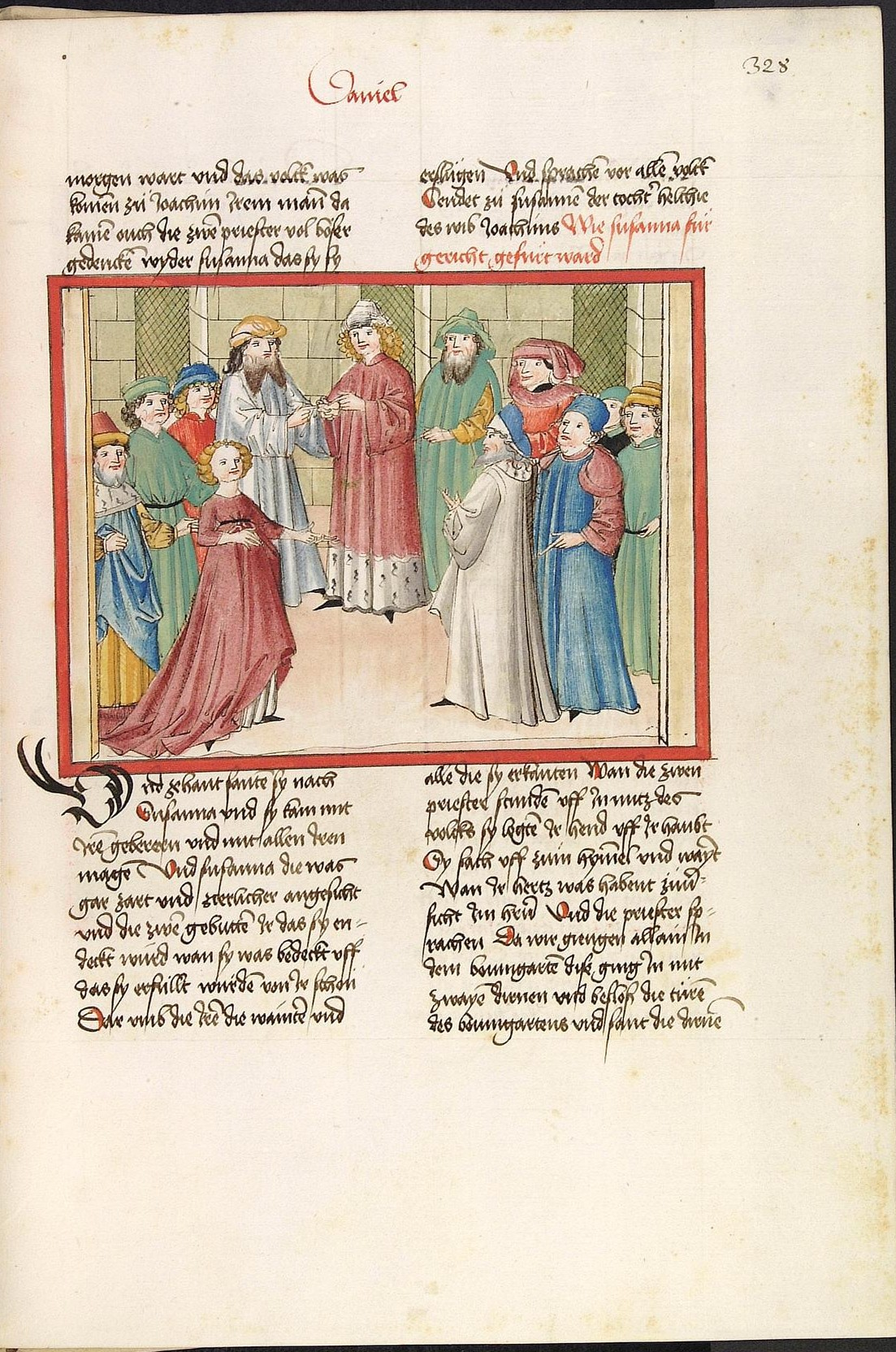 Codex Palatinus germanicus 18, Blatt 328r - Bibel, Altes Testament, Buch Daniel: Susanna wird vor das Gericht geführt. (Cpg 18 = Bibel AT, deutsch: Psalter, Parabole, Ecclesiastes, Cantica canticorum, Sapienta, Ecclesiasticus, Propheten)